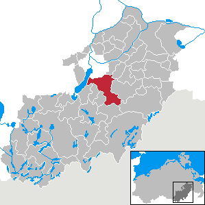 Burg Stargard in Mecklenburg-Vorpommern, Landkreis Mecklenburg-Strelitz